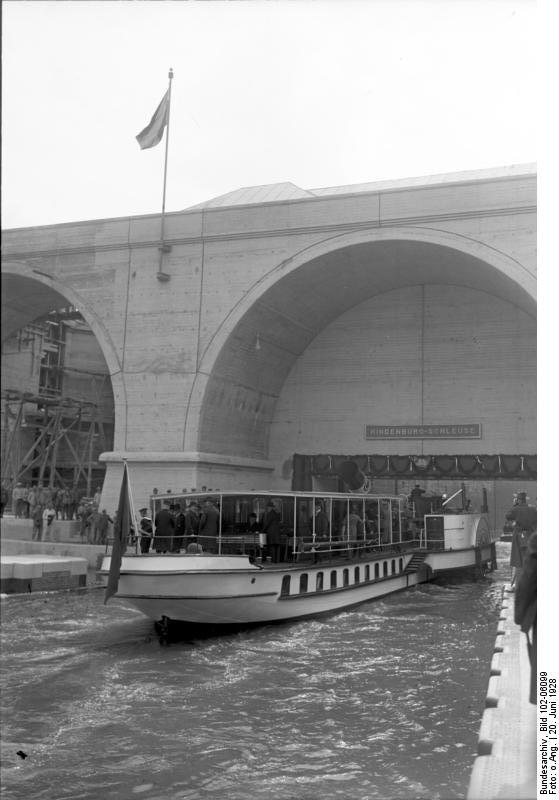 Die Einweihung der größten Binnenschleuse Europas in Anderten b./Hannover fand am 20. Juni durch den Reichspräsidenten von Hindenburg statt. Das erste Schiff mit dem Reichspäsidenten von Hindenburg an Bord passiert die Einfahrt der neuen Hindenburg-Schleuse in Anderten bei Hannover.